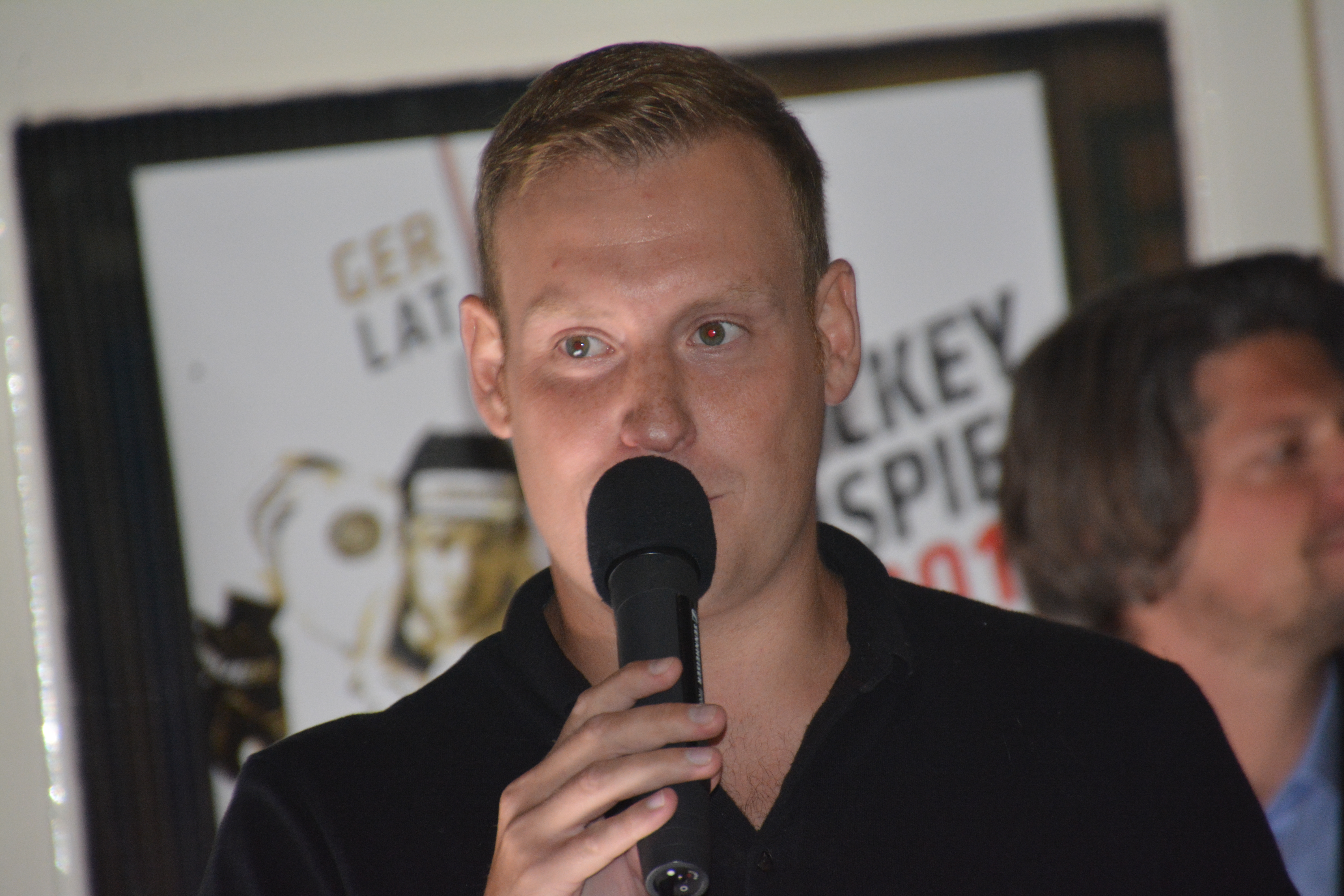 Moderator Jesper Dahl-Jörgensen bei der Sendung "Overtime" im September.